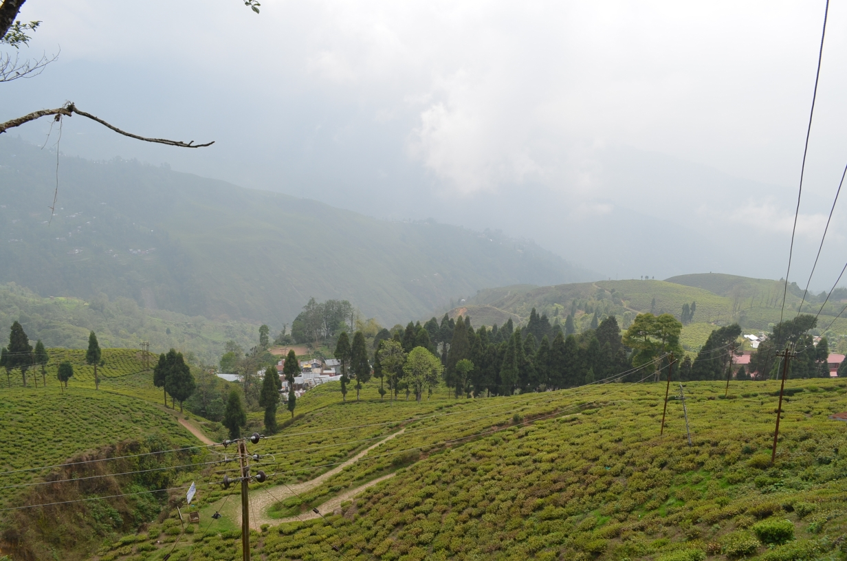 Happy Valley Tea Estate, Darjeeling.